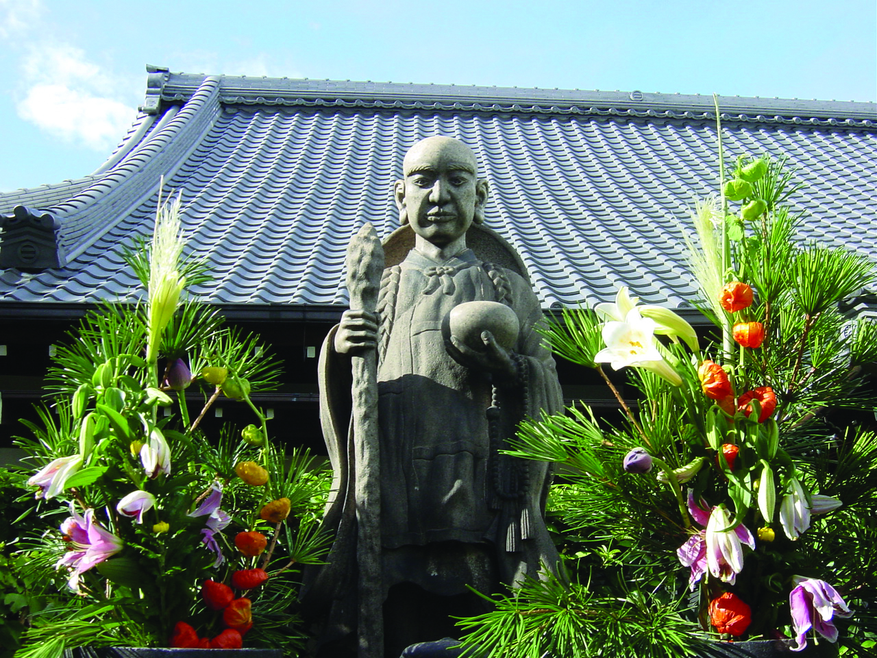 「同行二人」と申し、私たちと苦楽を共に歩む姿である